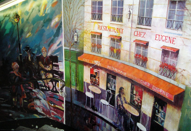 Métro, Paris - Denfert-Rochereau